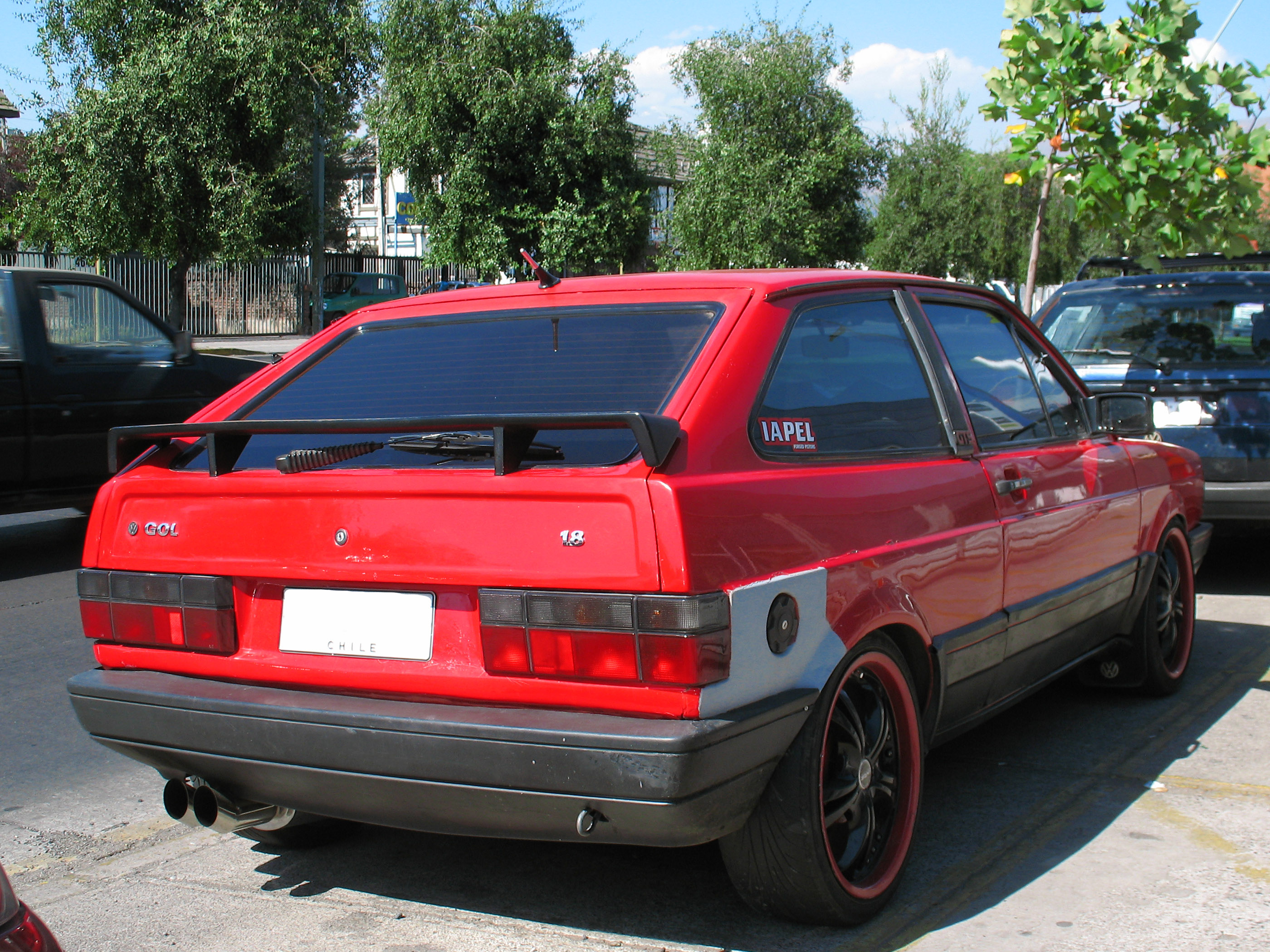 Volkswagen Gol 1.8 GTS 1988